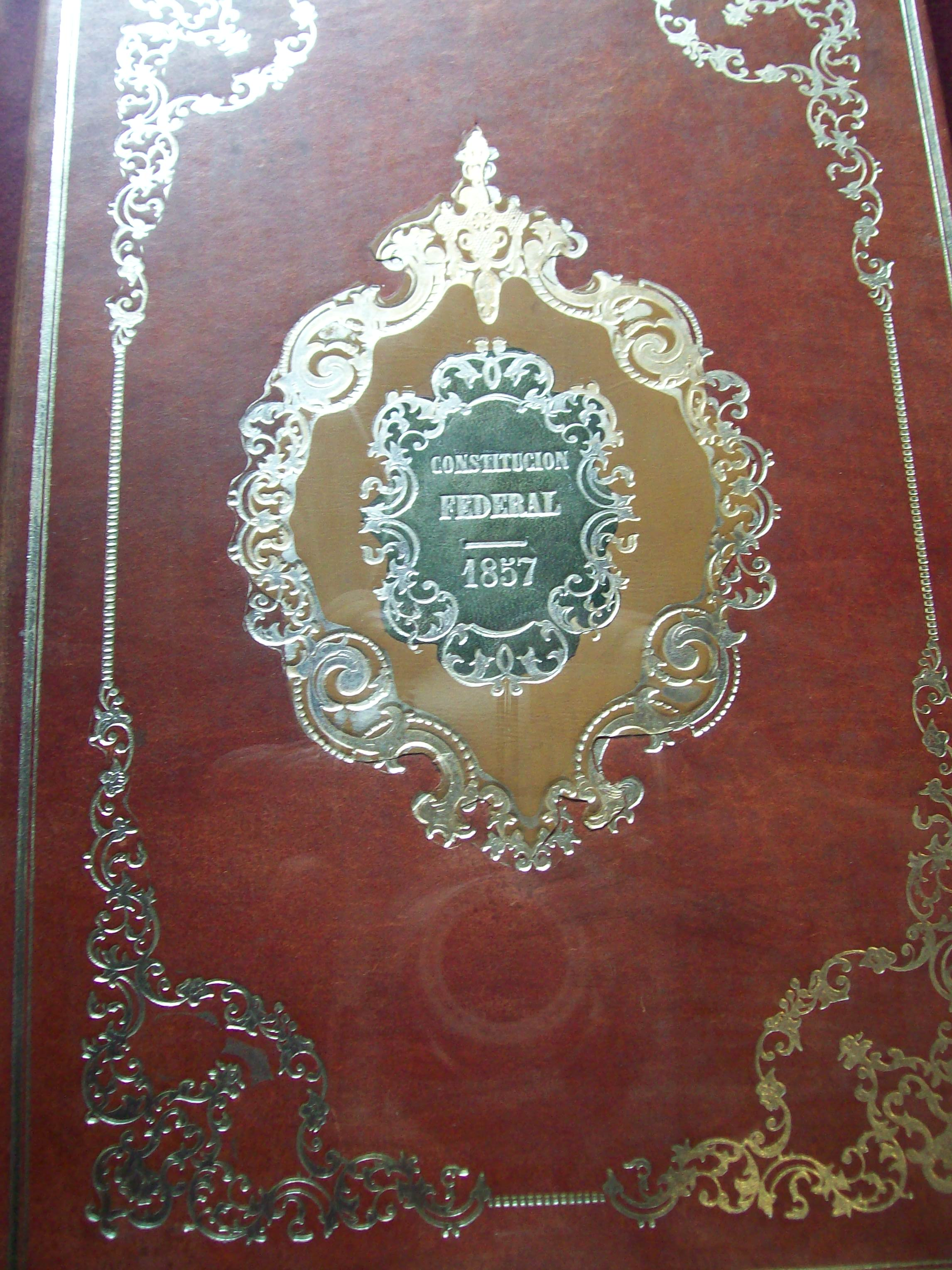 Constitución Federal de los Estados Unidos Mexicanos de 1857, foto tomada en el Museo Nacional de las Intervenciones (México)